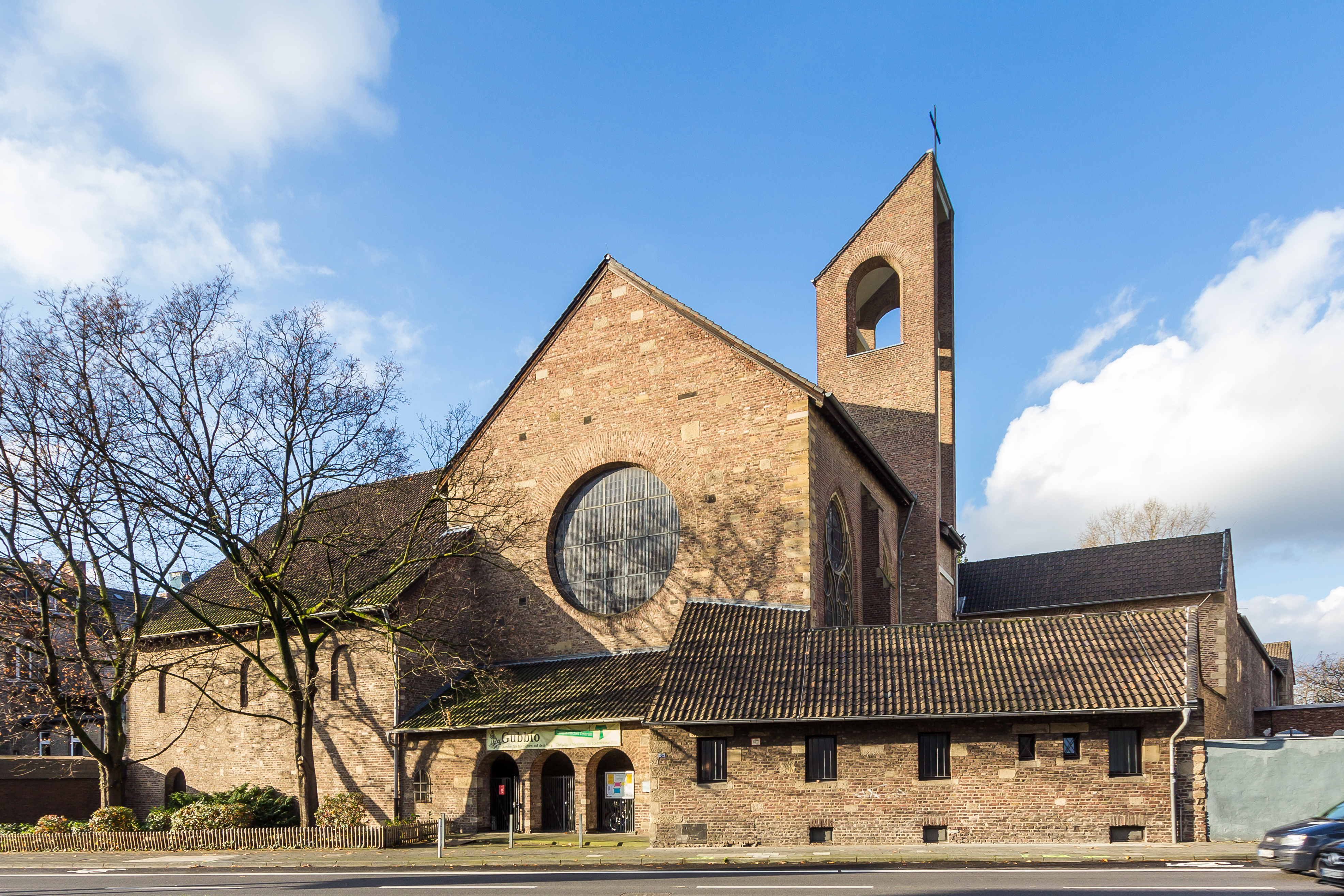 Franziskanerkirche St. Marien, Köln.